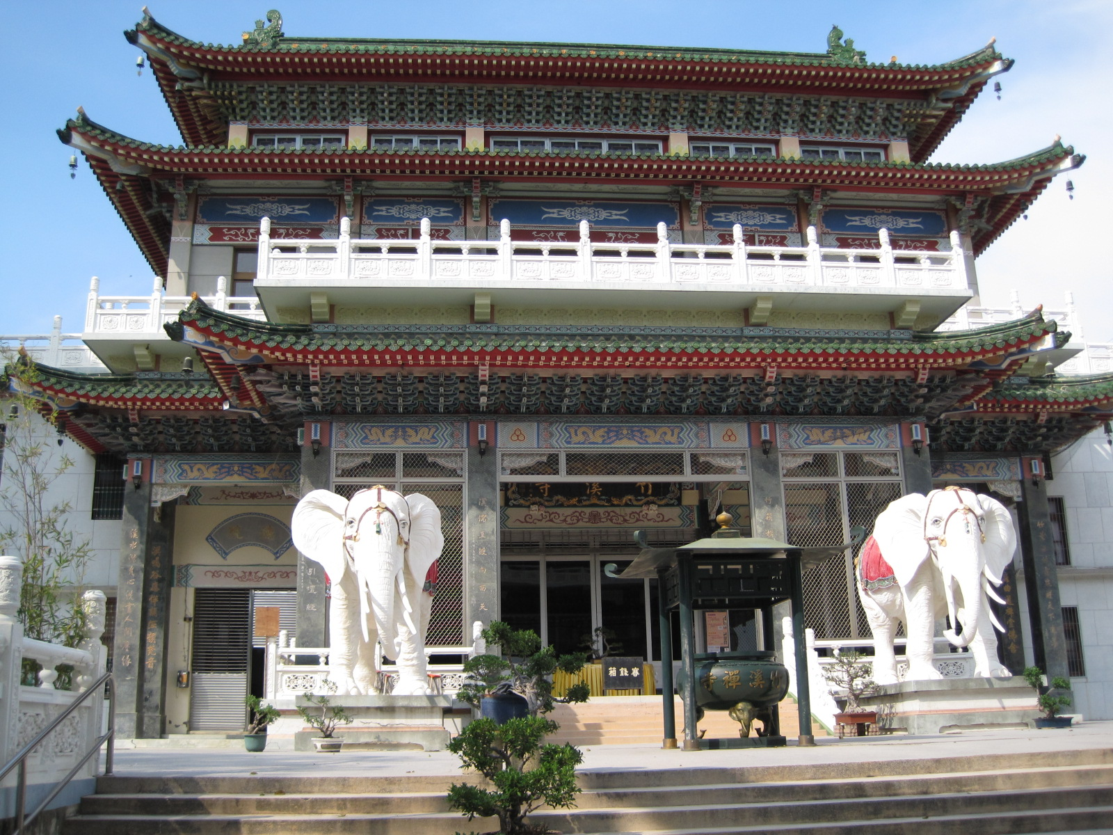 臺南竹溪寺